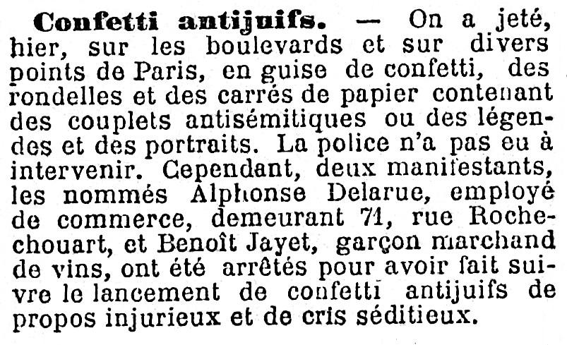 Article rapportant le jet de confettis antisémites au moment de la Mi-Carême 1899 à Paris. Cette grande fête carnavalesque et apolitique parisienne tombant cette année-là en pleine affaire Dreyfus.